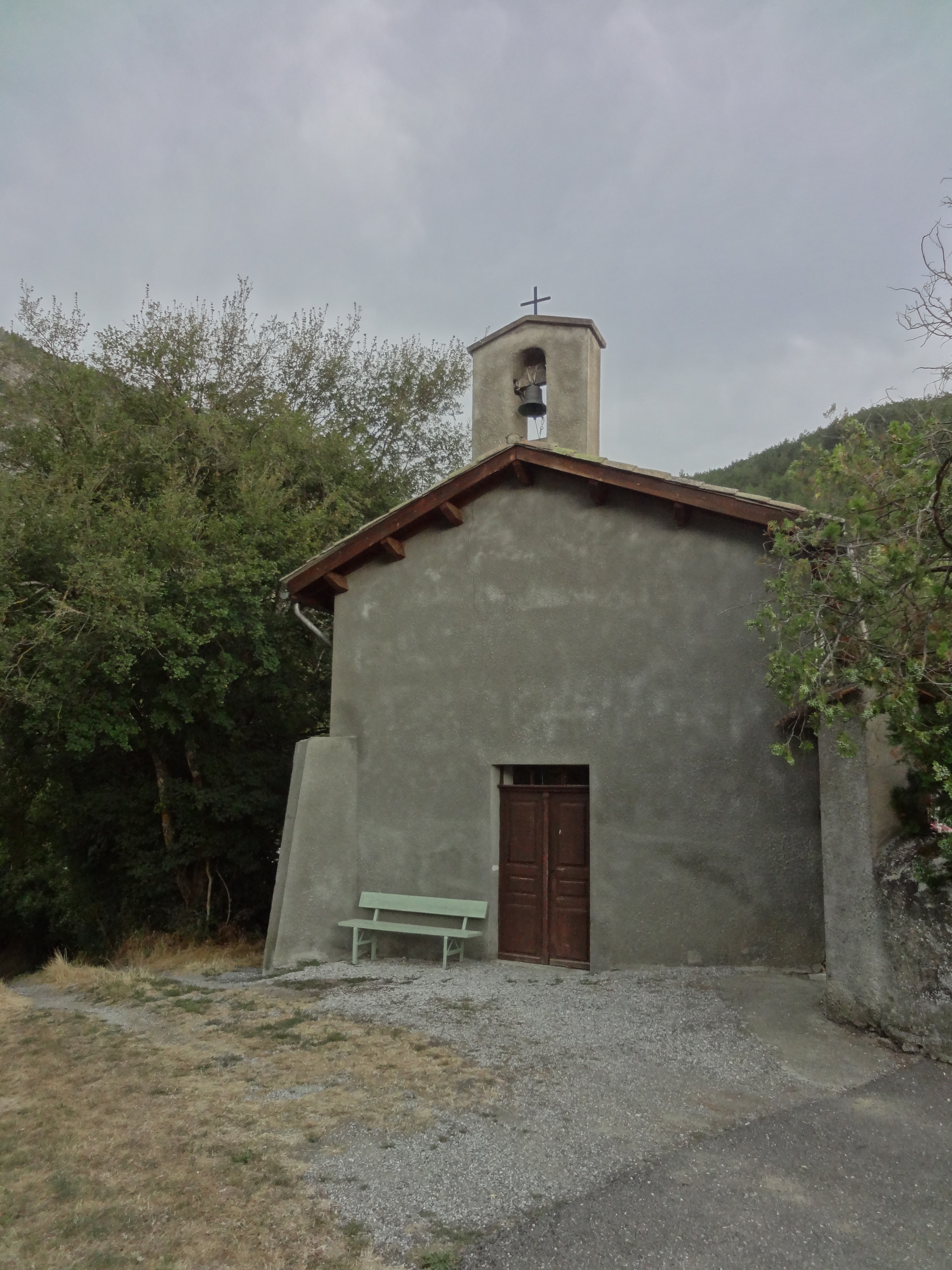 La chapelle Sainte-Colombe de Chaudol, La Javie, France.